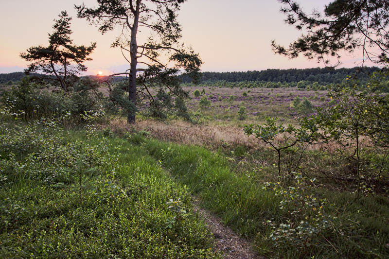 Sommerabend mit Blick auf die entwässerte Ebene im Naturschutzgebiet „Heilsmoor“ (NSG LÜ 077) im Landkreis Osterholz, Niedersachsen